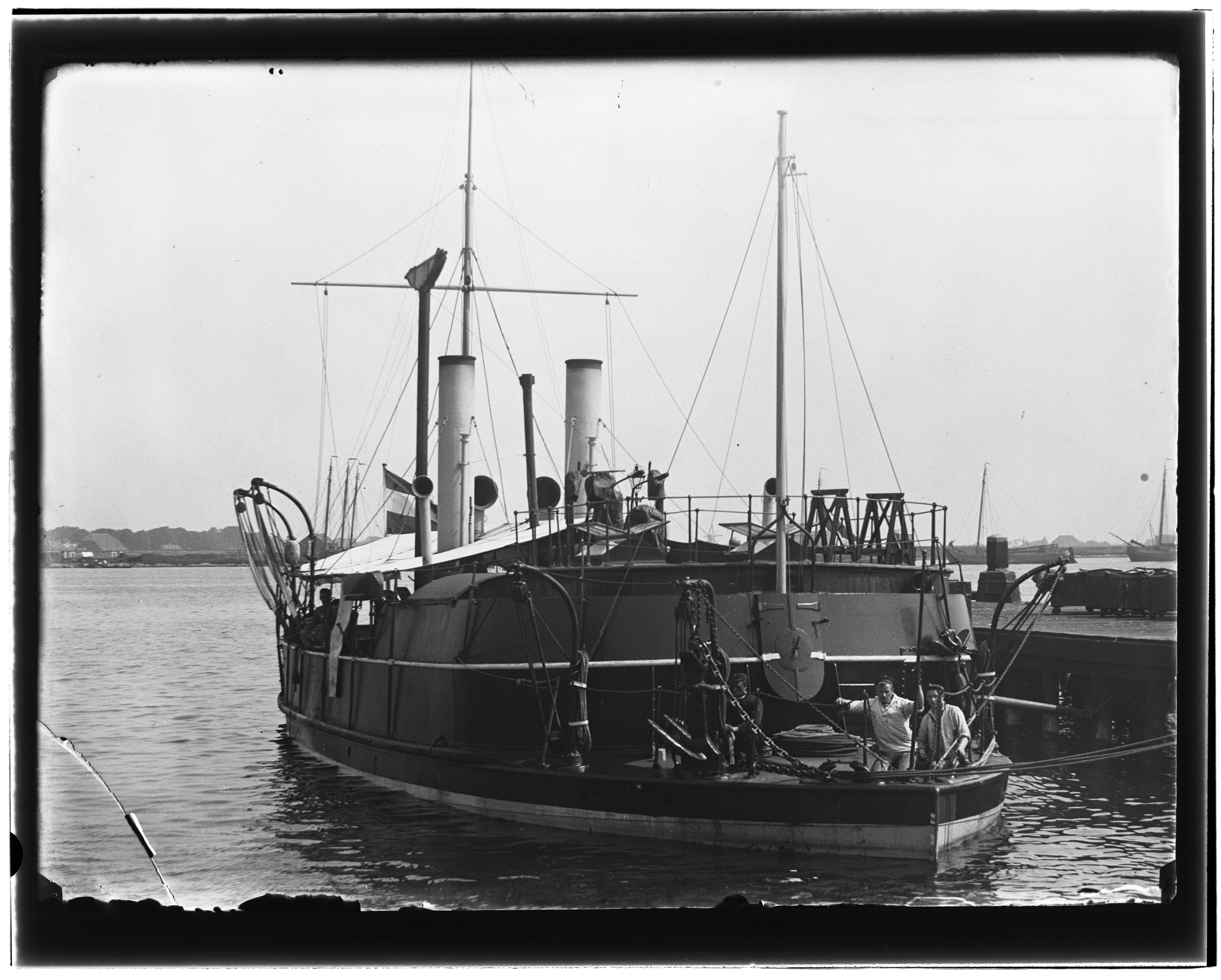 Beschrijving De Ruijterkade Kanonneerboot Koninklijke Marine Zr.MS 'Ever'. Documenttype foto Vervaardiger Olie``, Jacob (1834-1905) Collectie Collectie Jacob Olie Jbz. Datering 6 juni 1899 Geografische naam De Ruijterkade Inventarissen Afbeeldingsbestand 10019A001228 Generated with Dememorixer